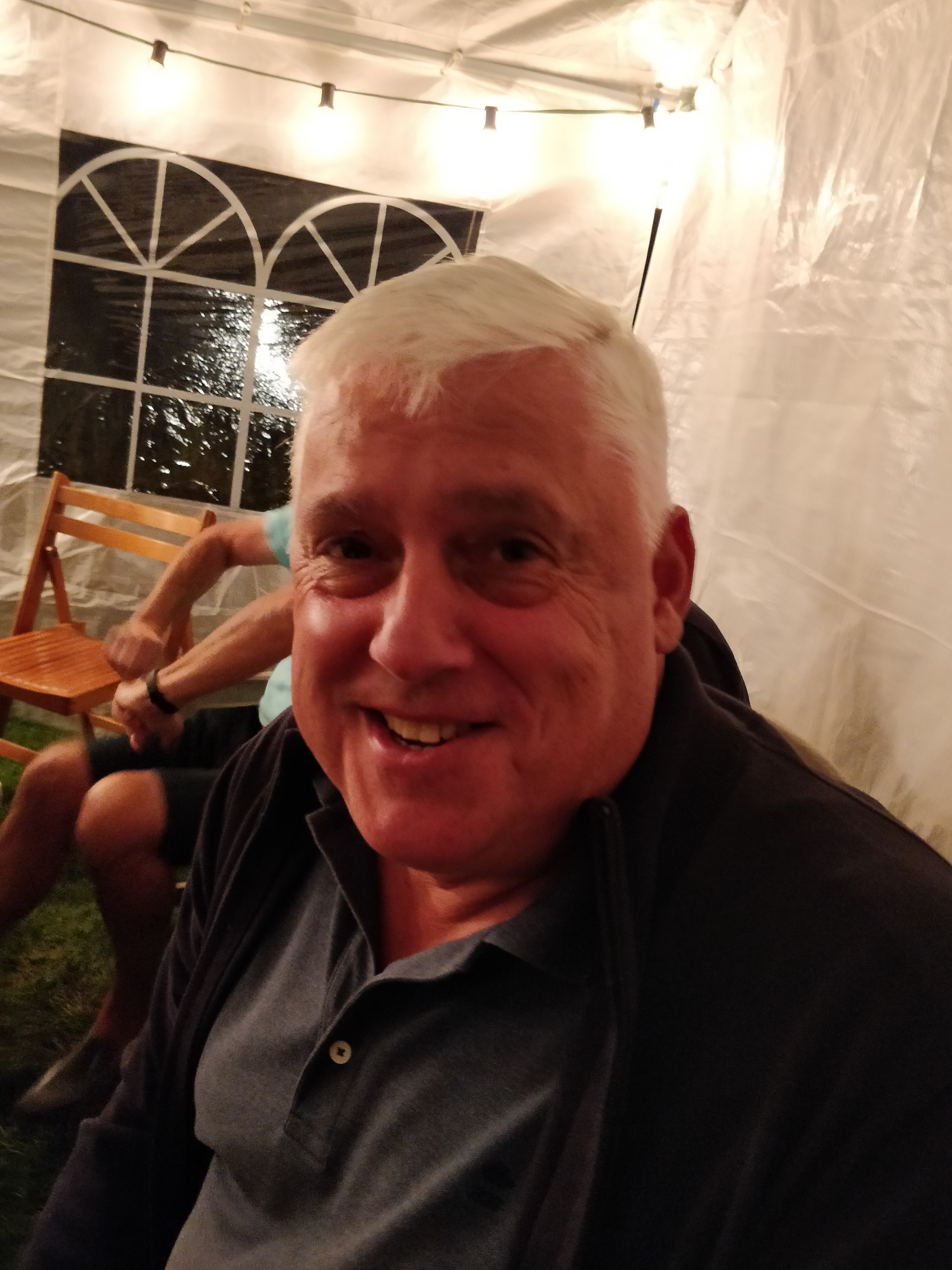 Philippe Desmet